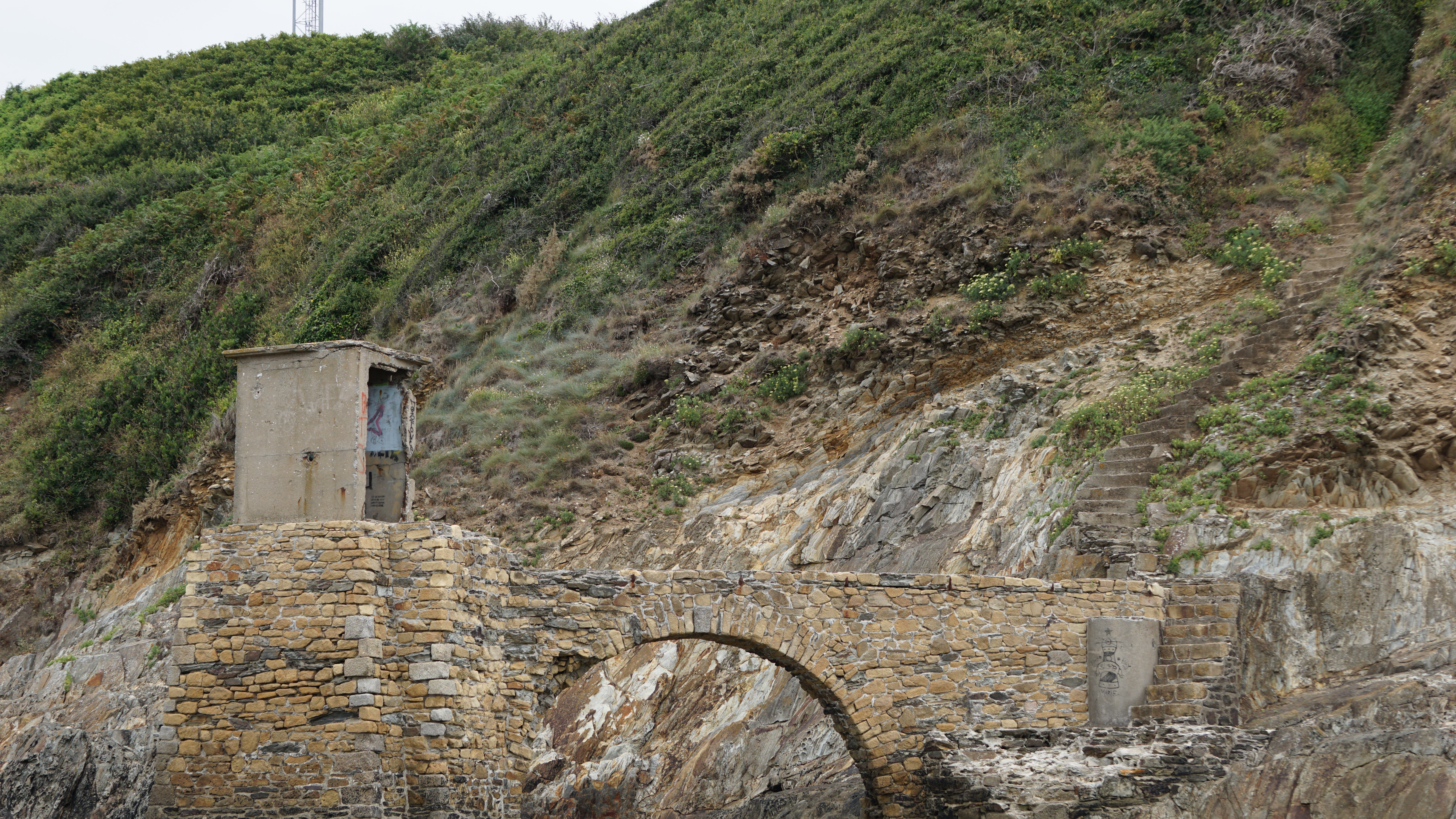 En prenant les escaliers , vous pouvez accéder aux rivages ( marrée basse) , et même vous prommener .